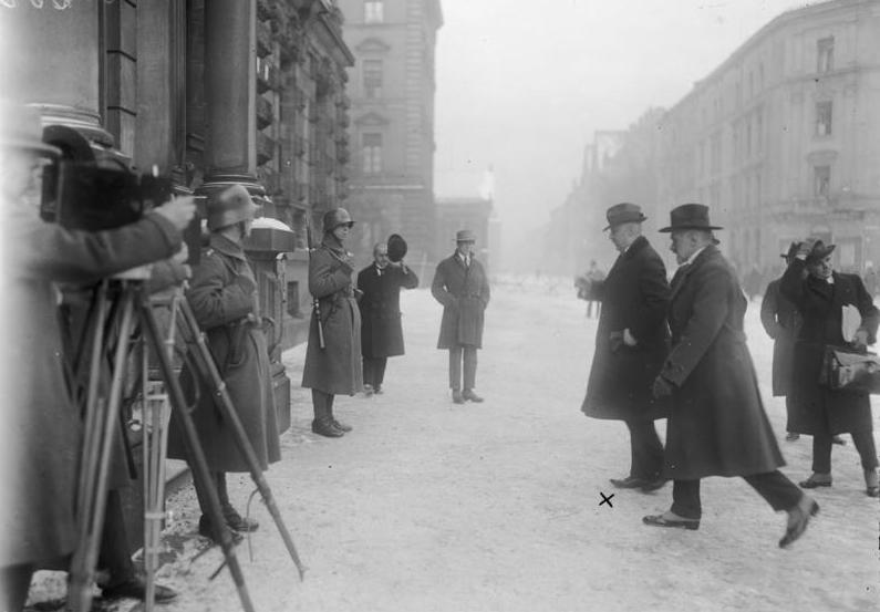 Zu dem Hitler-Ludendorf-Prozess in München. General von Ludendorf (X) mit seinem Verteidiger begibt sich zur Verhandlung.